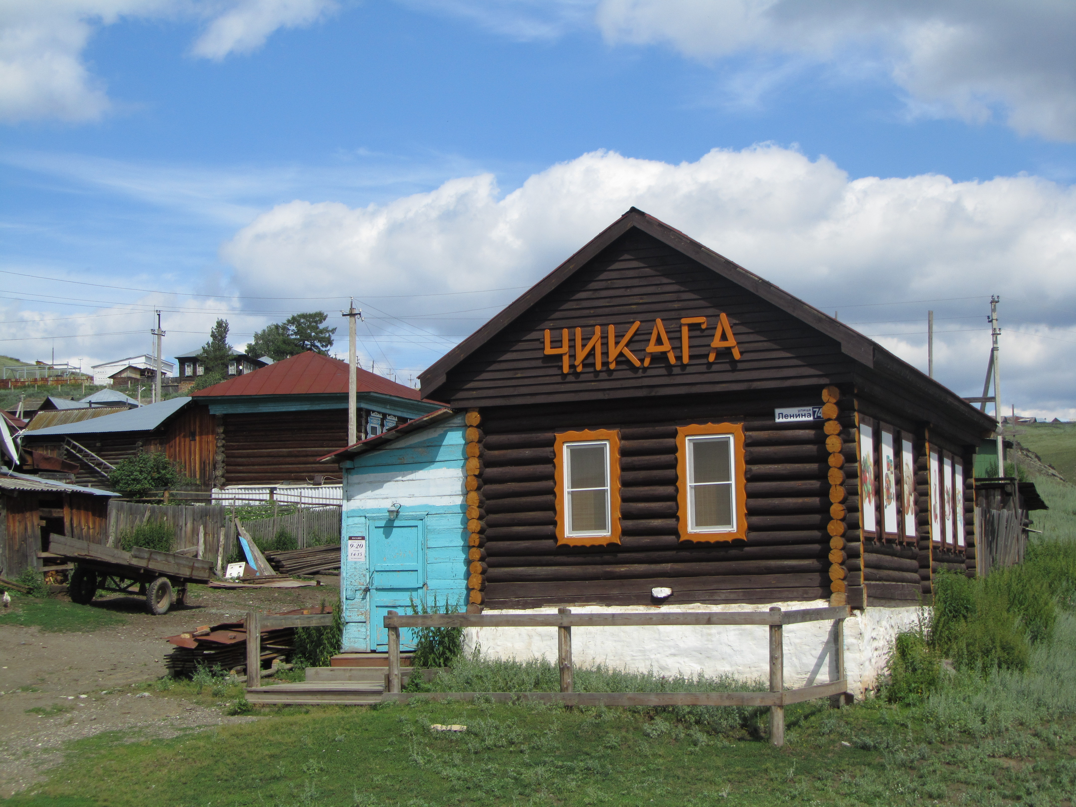 Башҡортса: Белорет районы Ҡағы ауылында магазин